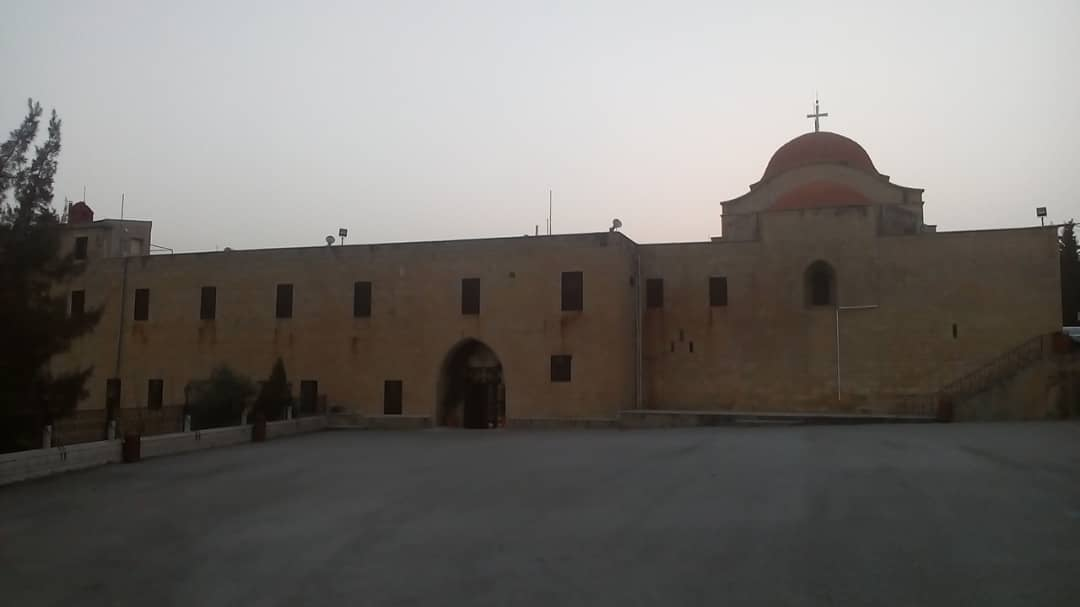 دير مارجرجس الحميراء